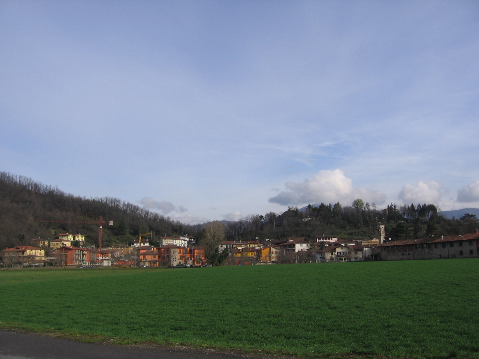 Montello, Bergamo, Italia